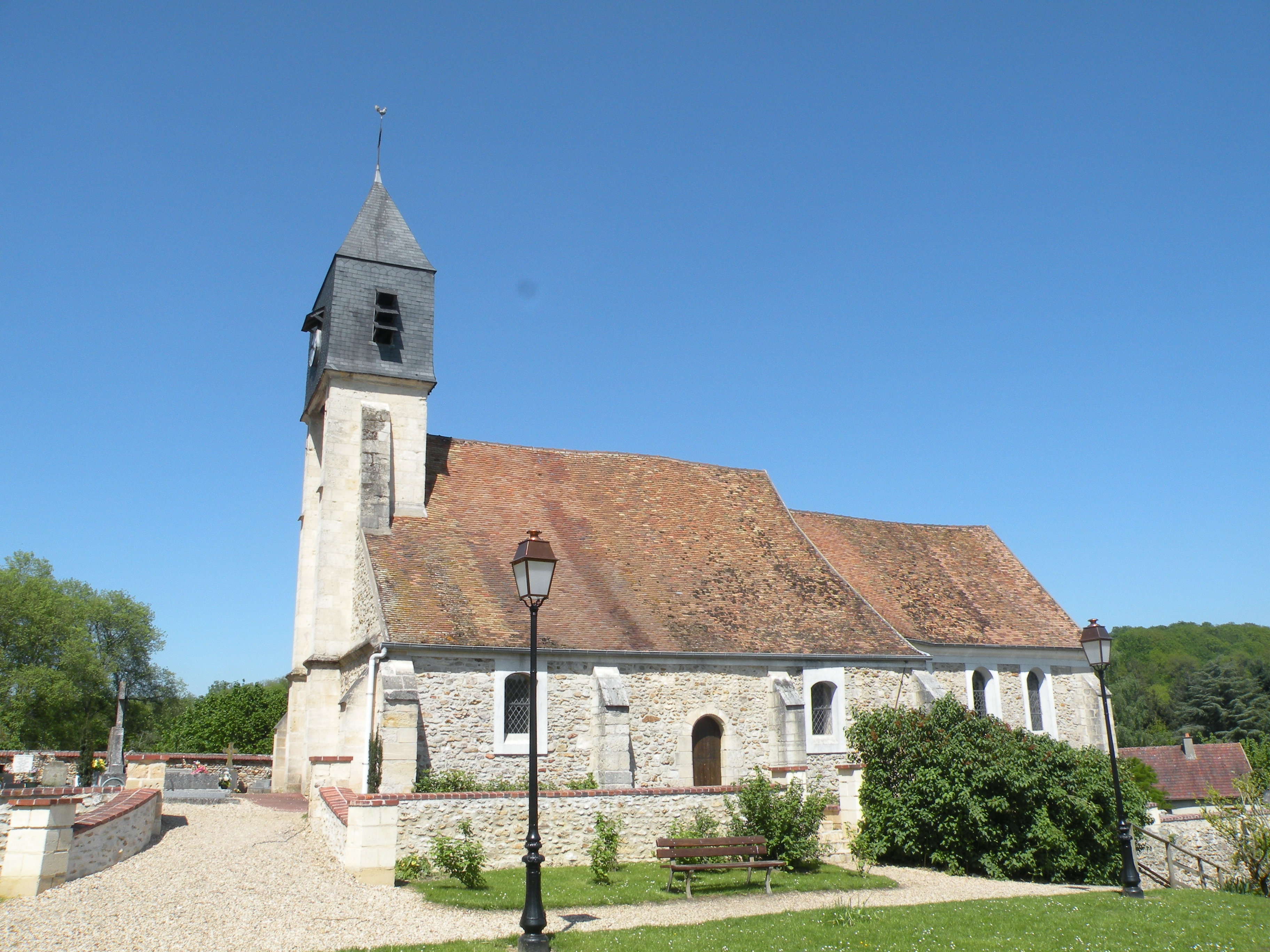 église